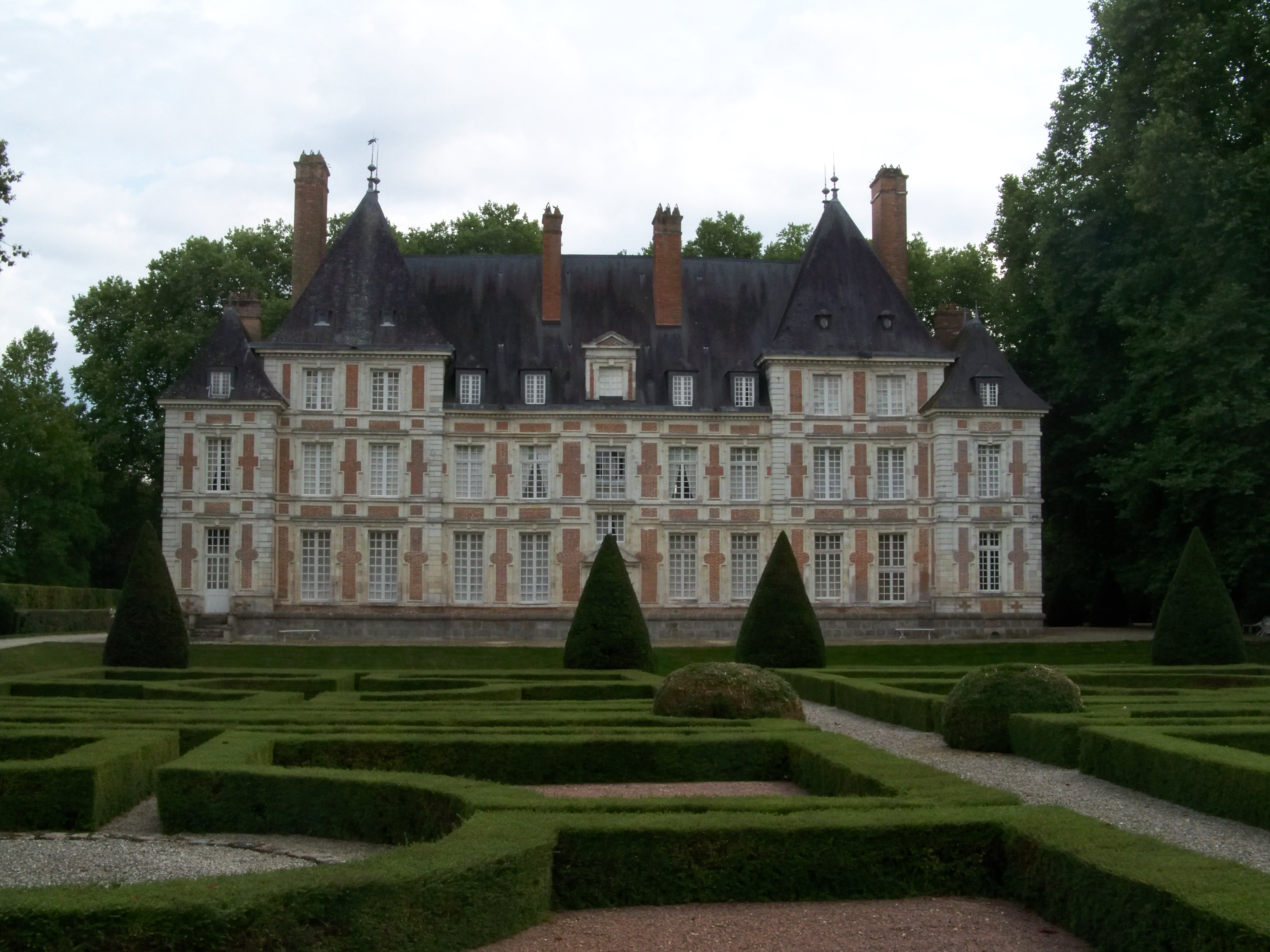 Le Château de Barberey-Saint-Sulpice, inscrit au titre des monuments historiques depuis 2001 (anciennement classé en 1980) .